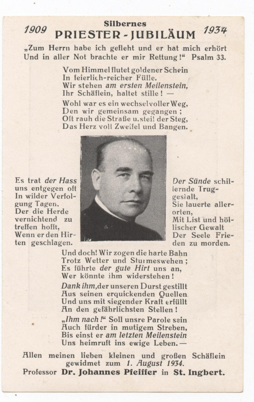 Professor Johannes Pfeiffer, Bildchen zum Priesterjubiläum 1934